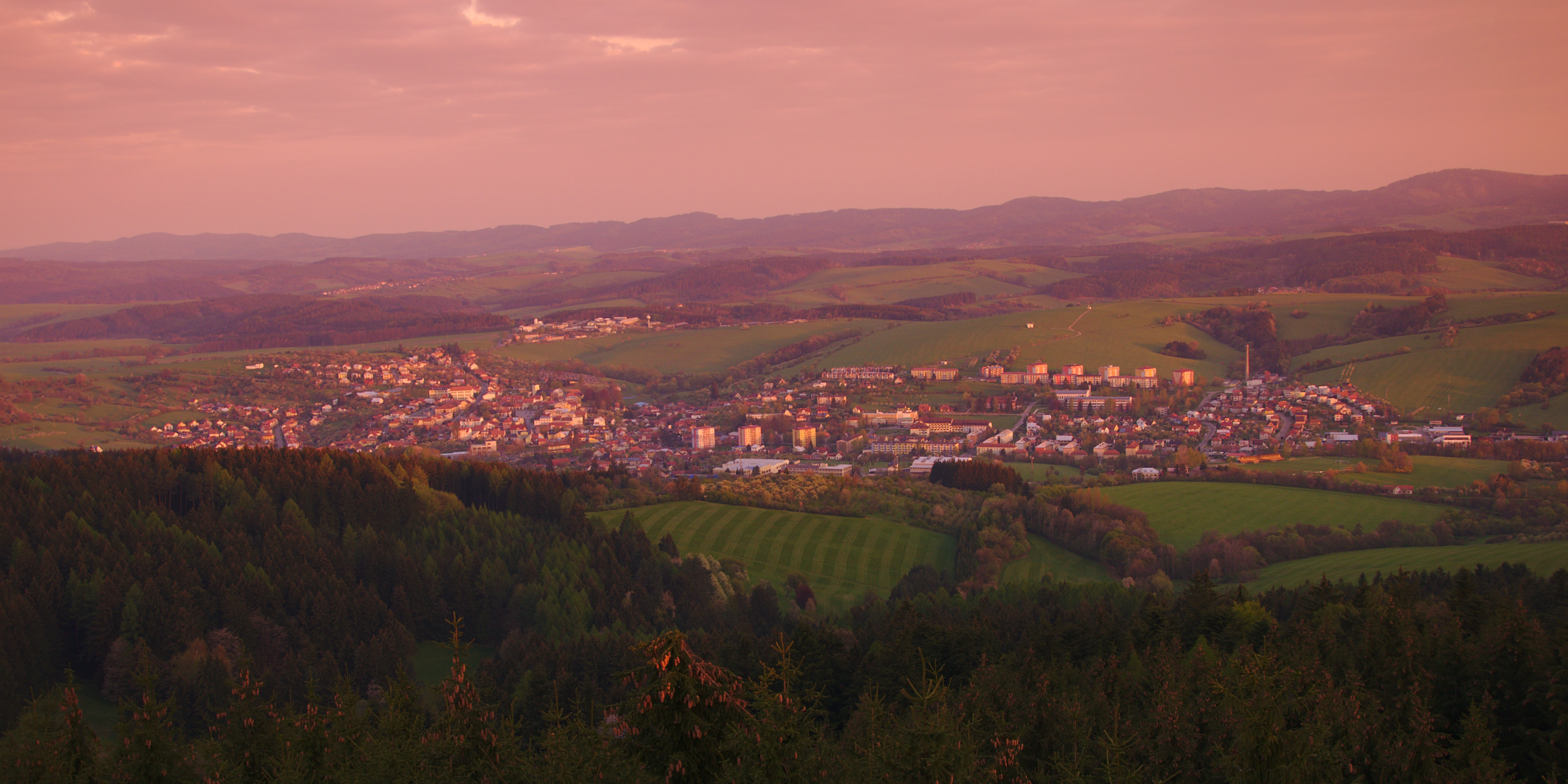 Město z rozhledny Královec při východu slunce, Valašské Klobouky, okres Zlín